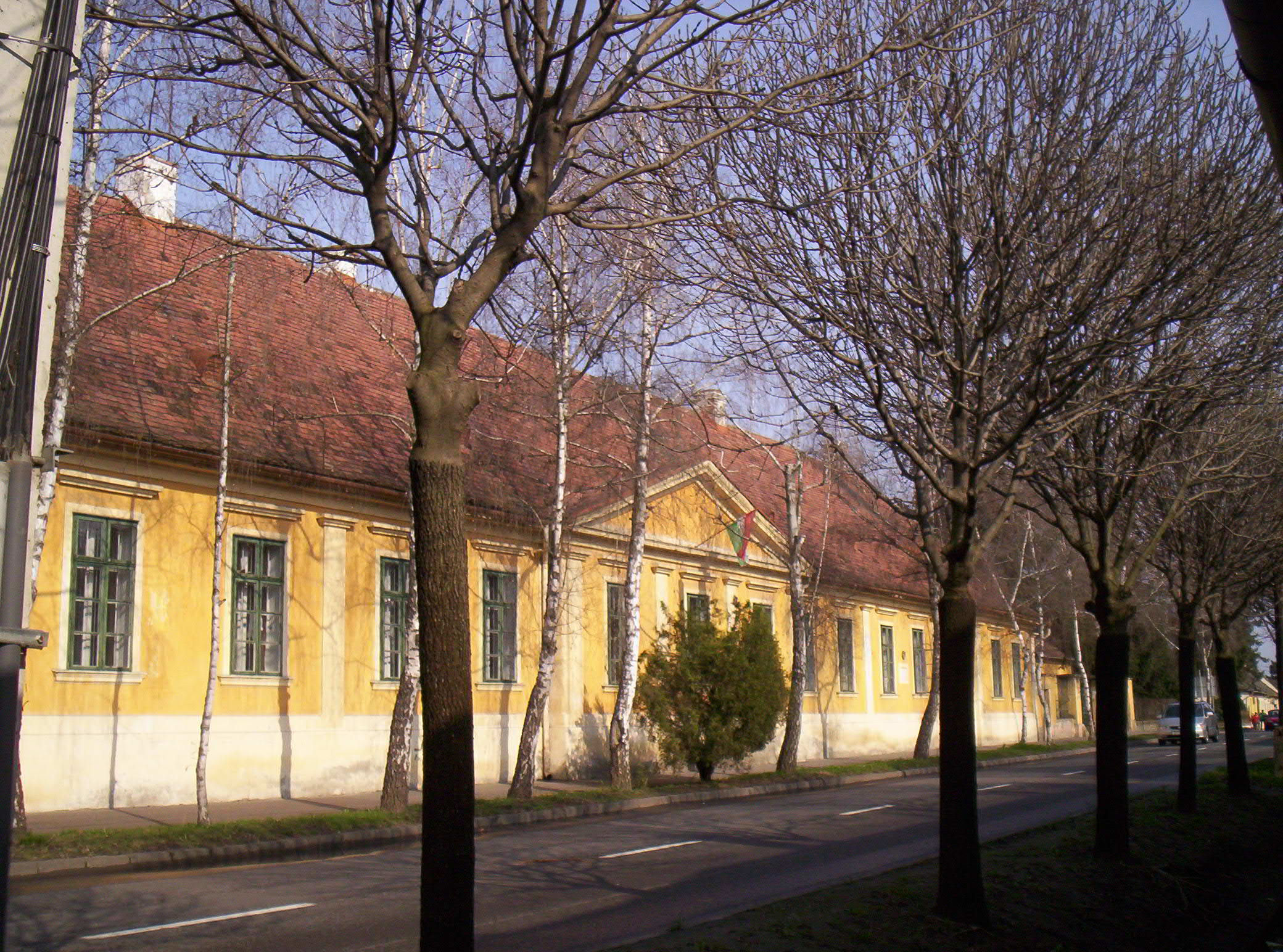 Perczel Mór honvéd tábornok szülőháza Bonyhádon – photo taken by uploader User:Csanády in 2007.